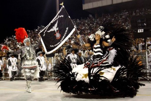 Desfile da Gaviões da Fiel em 2010